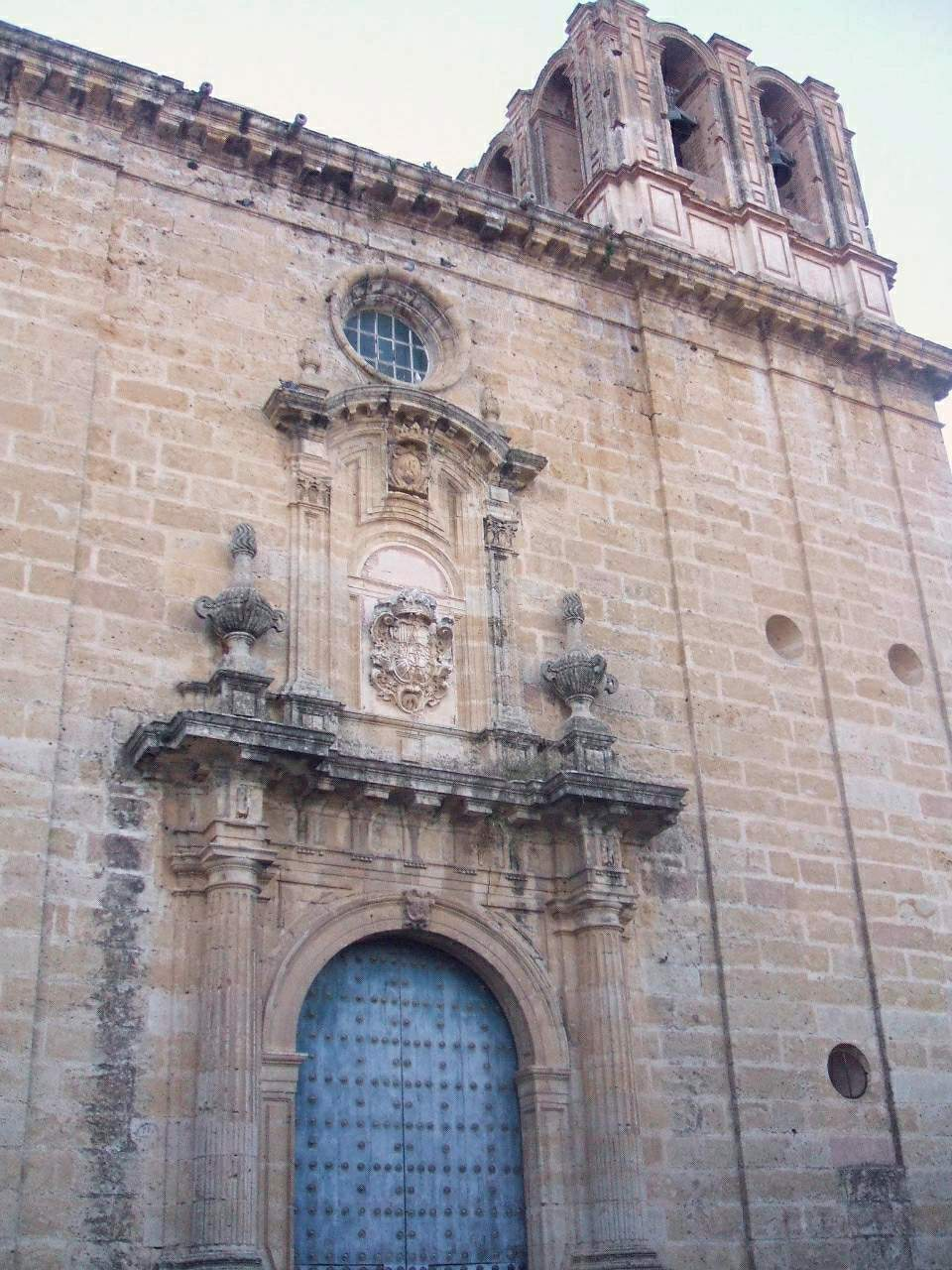 Iglesia del Divino Salvador (Carmona)